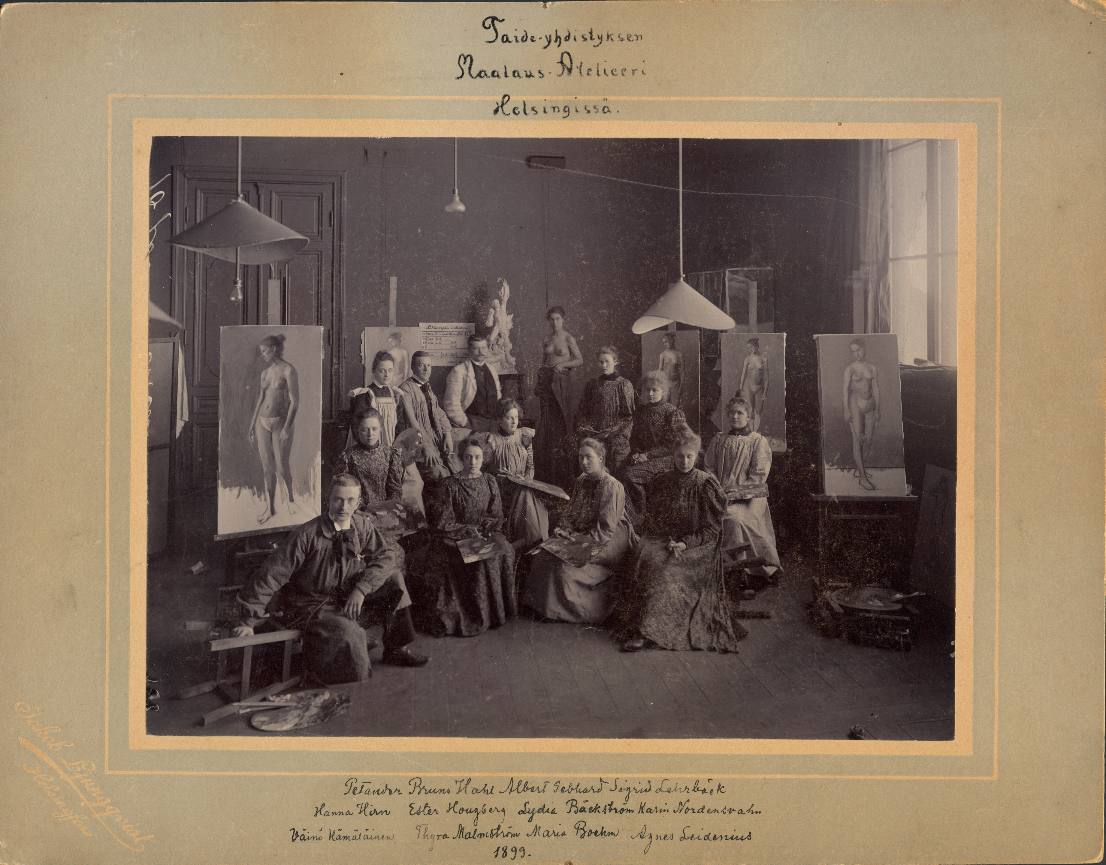 Students of Finnish Art Society's Drawing School in Ateneum: Petander, Bruno Hahl, teacher Albert Gebhard, Sigrid Lehrbäck, middle row on the left. Hanna Hirn, Ester Hougberg, Lydia Bäckström, Karin Nordenswan, Väinö Hämäläinen, Thyra Malmström, Maria Boehm and Agnes Leidenius. Suomen Taideyhdistyksen Piirustuskoulun oppilaita Ateneumissa: Petander, Bruno Hahl, opettaja Albert Gebhard, Sigrid Lehrbäck, keskir. vas. Hanna Hirn, Ester Hougberg, Lydia Bäckström, Karin Nordenswan, Väinö Hämäläinen, Thyra Malmström, Maria Boehm ja Agnes Leidenius. Original / originaali: date / ajoitus: 1899 photographer / valokuvaaja: Jakob Ljungqvist, Helsinki techinique / tekniikka: gelatine print / gelatiinivedos type / tyyppi: black and white print, cardboard based / mustavalkovedos, kartonkipohjustettu measurements / mitat: 245 mm x 313 mm No. / nro. 40005.018 (repro); 50010.273 (orig.) (Archive of Väinö Hämäläinen / Väinö Hämäläisen arkisto) Archive Collections, Finnish National Gallery / Arkistokokoelmat, Kansallisgalleria